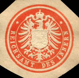 Sealing stamp Title: Reichsamt des Innern Description: Briefsiegel, rot, weiß, geprägt Place: size: 3 cm